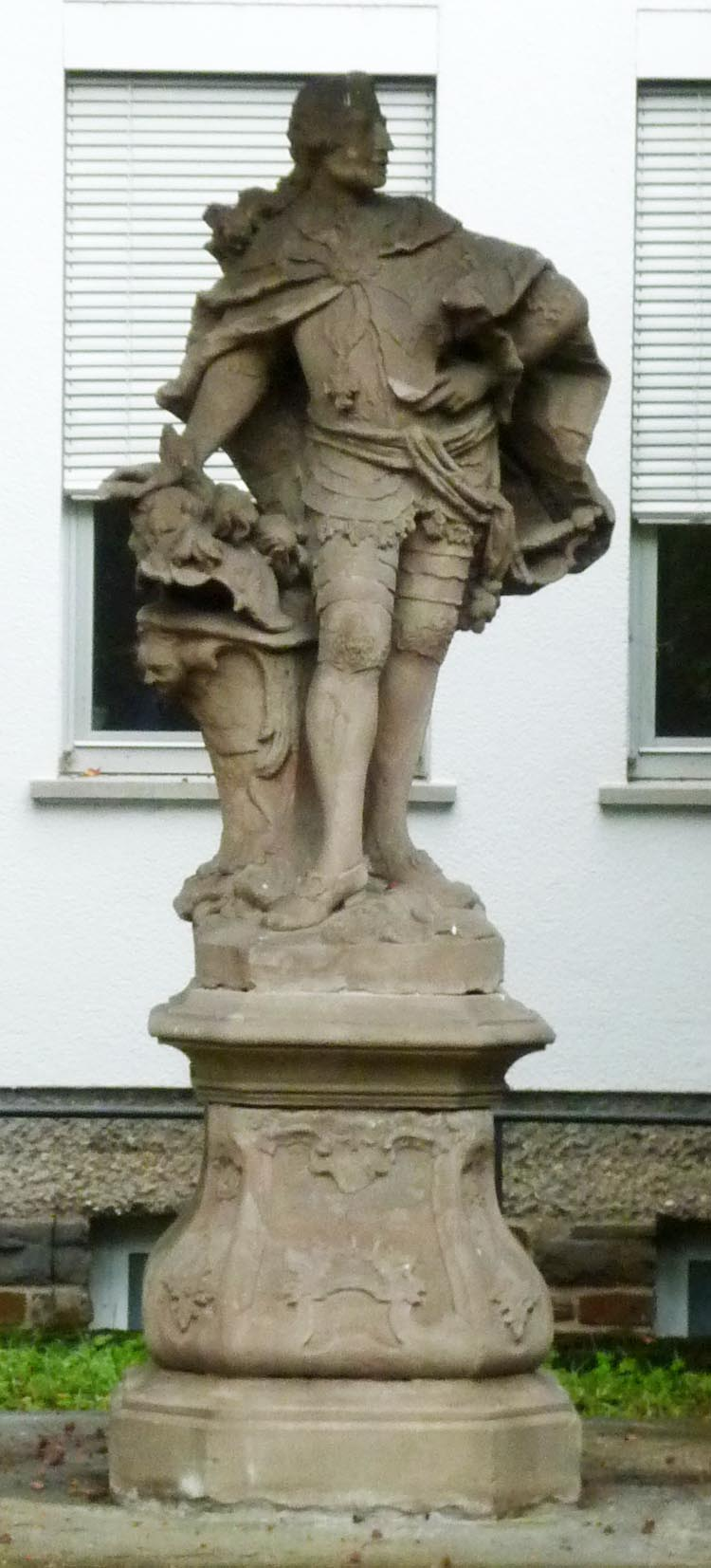 Denkmal Kurfürst Clemens August in Niederbieber, ehemaliger Standort an der Clemenshütte in Niederbreitbach